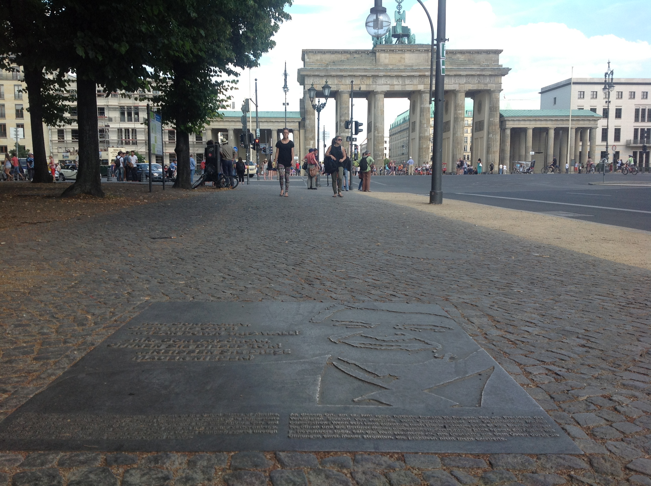 Ronald Reaganin muuuripuheen muistolaatta Brandenburgin portin läheisyydessä.